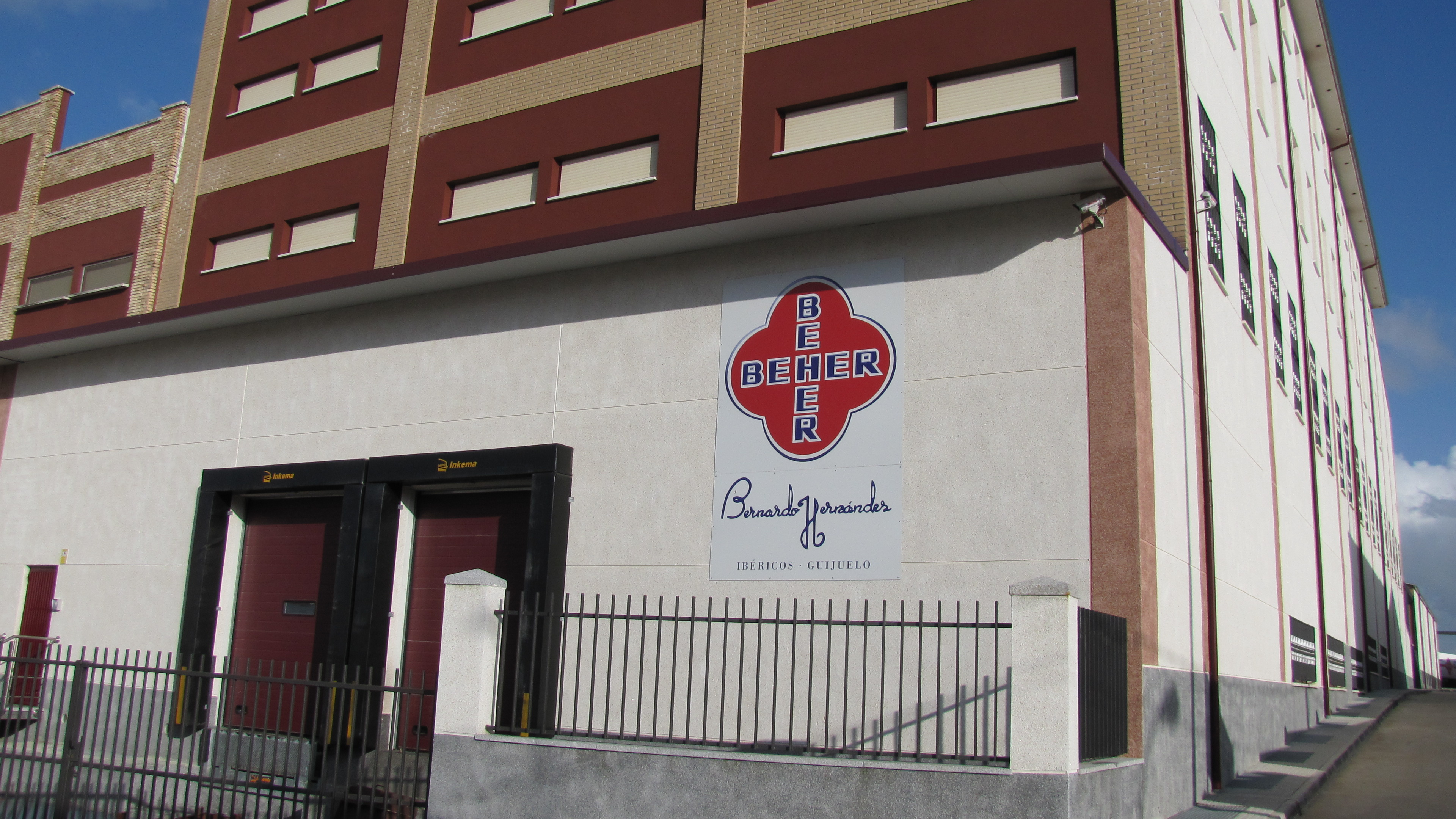 Entrada a las instalaciones fabriles de Jamón de BEHER en Guijuelo (Salamanca - España). En la Denominación Jamón de Guijuelo.